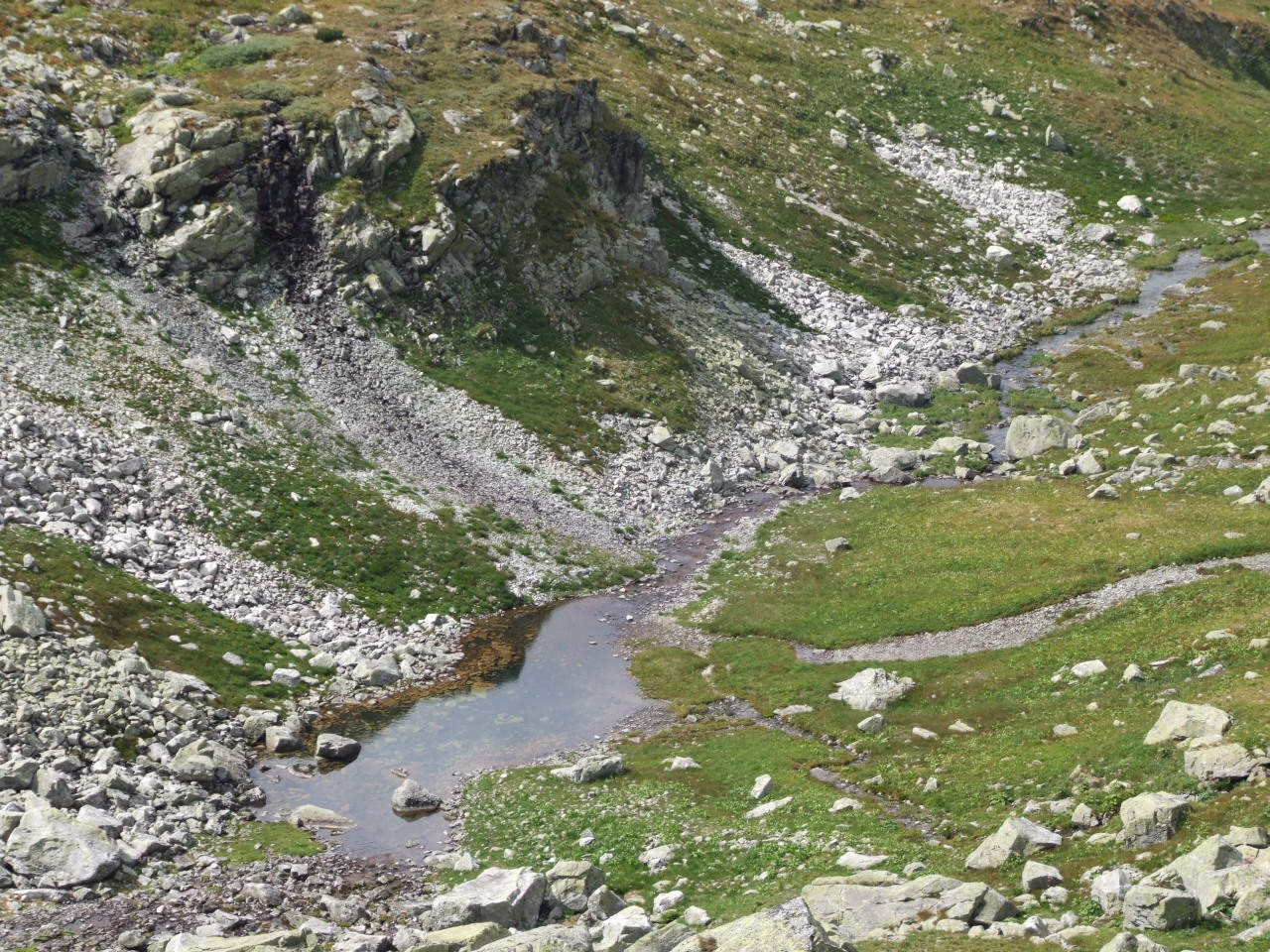 Wywierzysko Hlińskiego Potoku